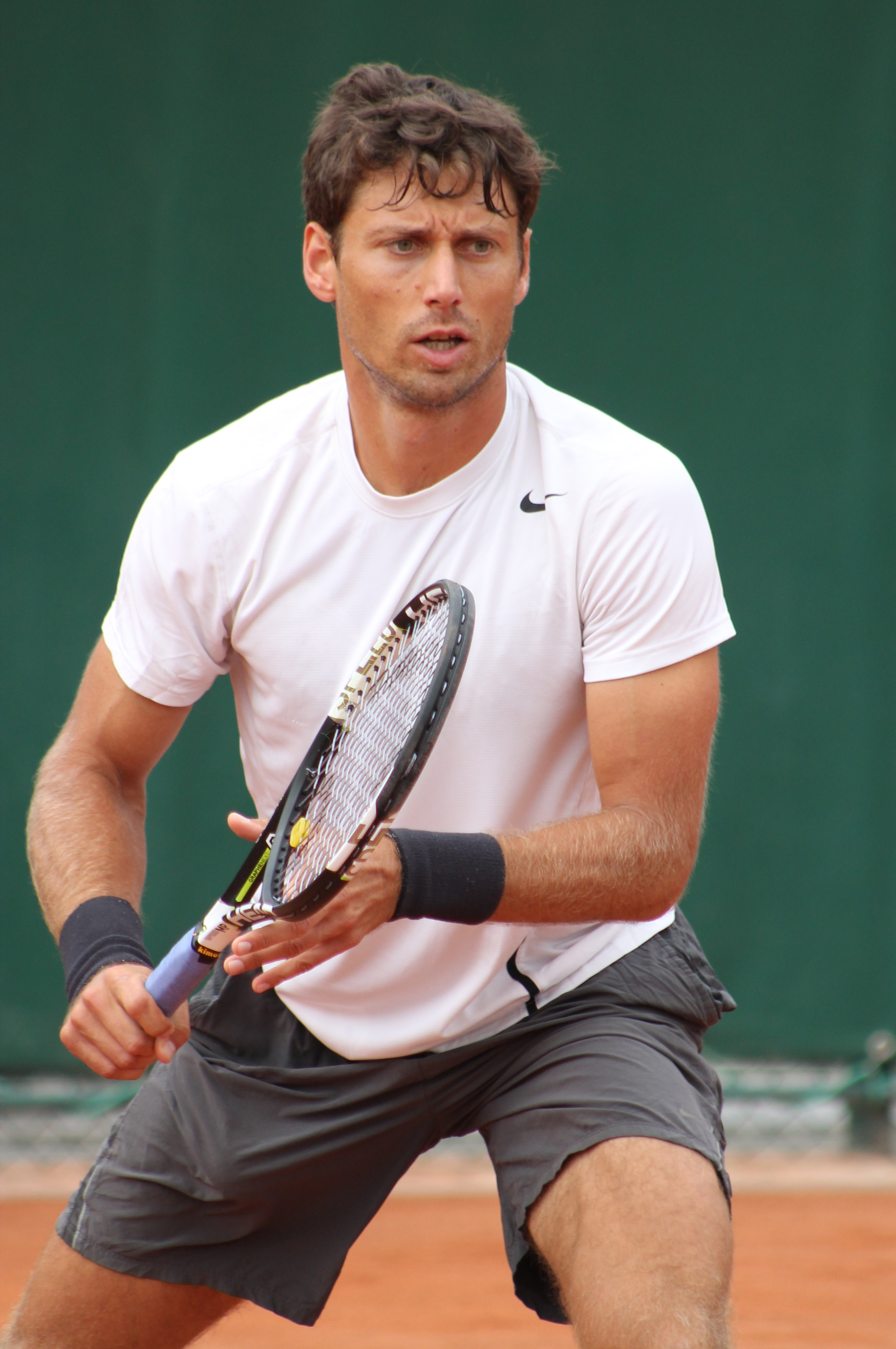 Sitak RG15 (1)